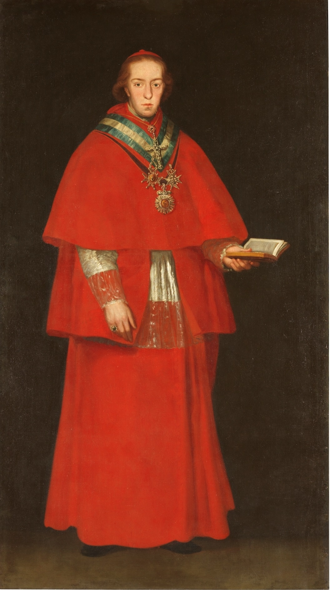 Retrato del cardenal español Luis María de Borbón y Vallabriga (1777-1823), que era hijo del infante Luis de Borbón y Farnesio y nieto del rey Felipe V de España. Fue arzobispo de Sevilla y también de Toledo y murió en Madrid el día 18 de marzo de 1823.